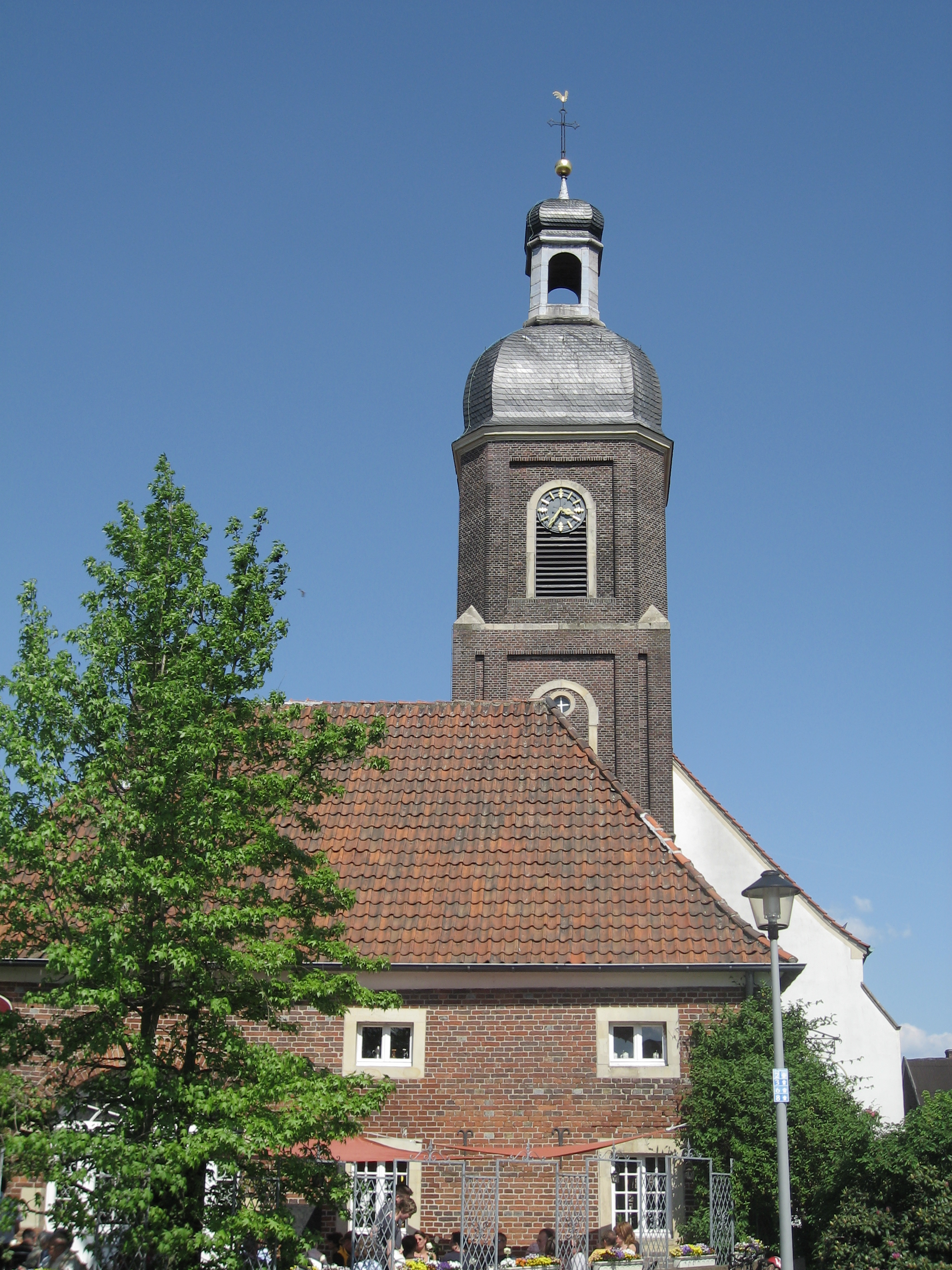 Kreis Coesfeld, Nordkirchen, katholische Kirche St. Mauritius, ab 1715 von Gottfried Laurenz Pictorius als barocke Hallenkirche erbaut